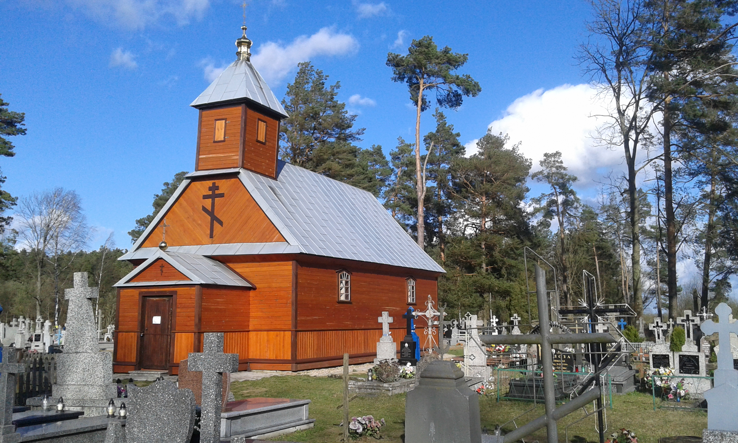 Nowoberezowo - cerkiew p.w. Przeobrażenia Pańskiego Беларуская (тарашкевіца): Новаберазова - Праабражэнская царква